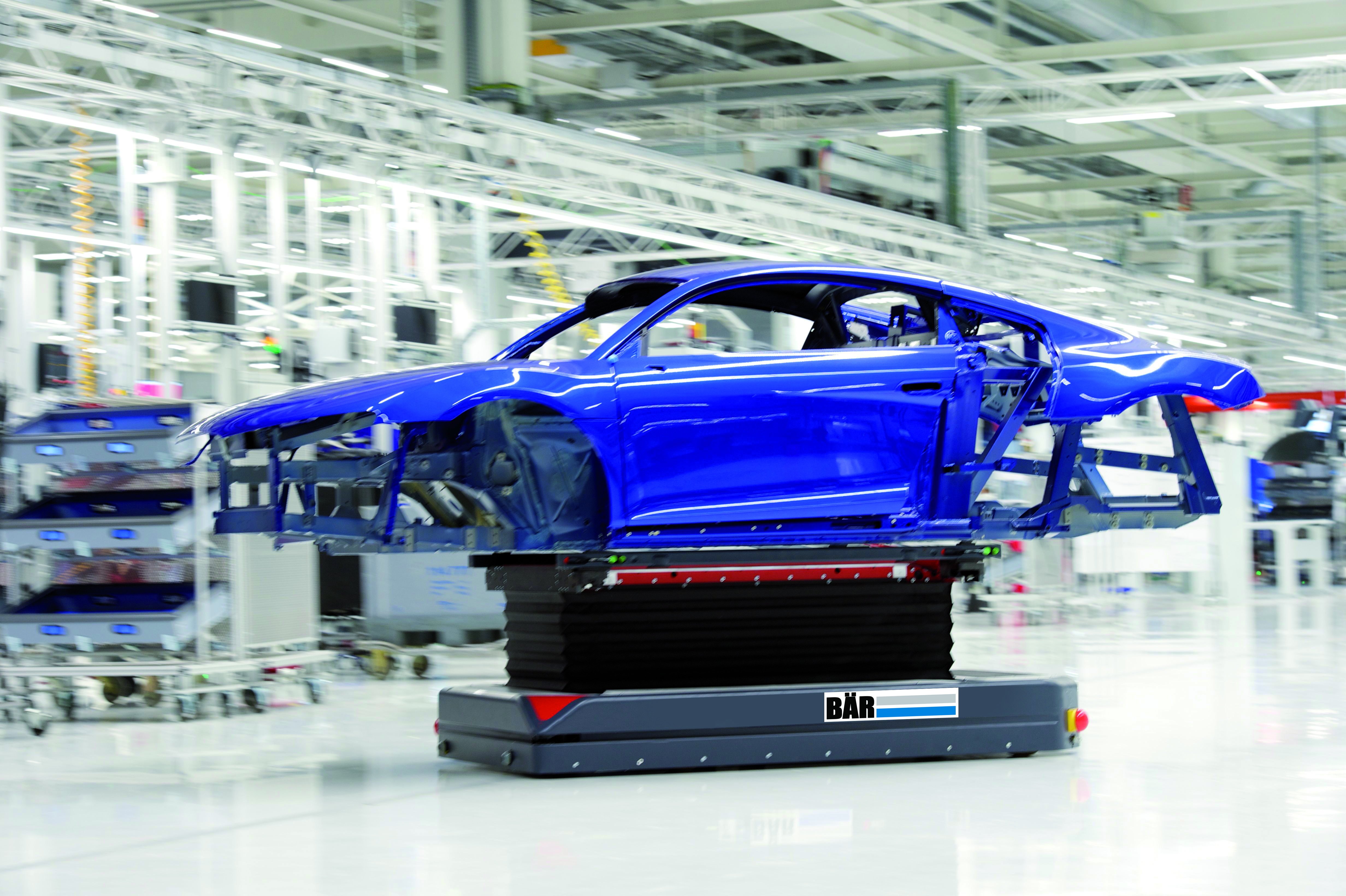 Audi AG: Fertigung des Audi R8 im Werk Böllinger Höfe in Heilbronn am 30.9.2014. FTF mit Hubtisch als mobile Montageplattform: Der Hubtisch fährt die Karosse auf die für den jeweiligen Werker ergonomisch richtige Höhe oder übergibt für Unterbodenmontage die komplette Karosse z.B. an eine Hub-/Schwenkbühne. Der Hubtisch hat einen elektromechanischen Antrieb, der eine Höhenverstellung von 300 mm (= Bauhöhe des FTF) bis auf 1.200 mm ermöglicht.